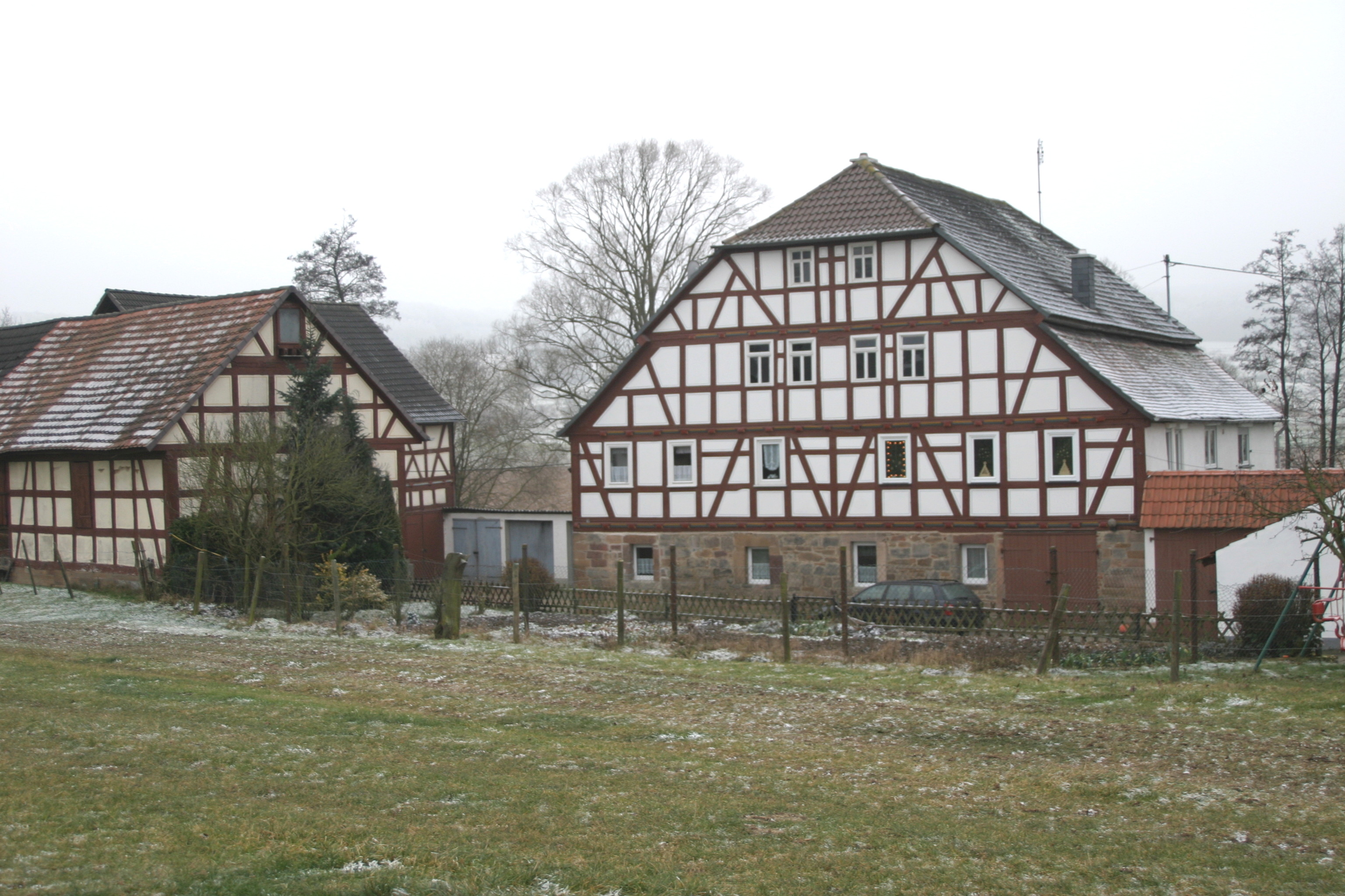 Aumühle Homberg/Ohm Nieder-Ofleiden 13.12.2004